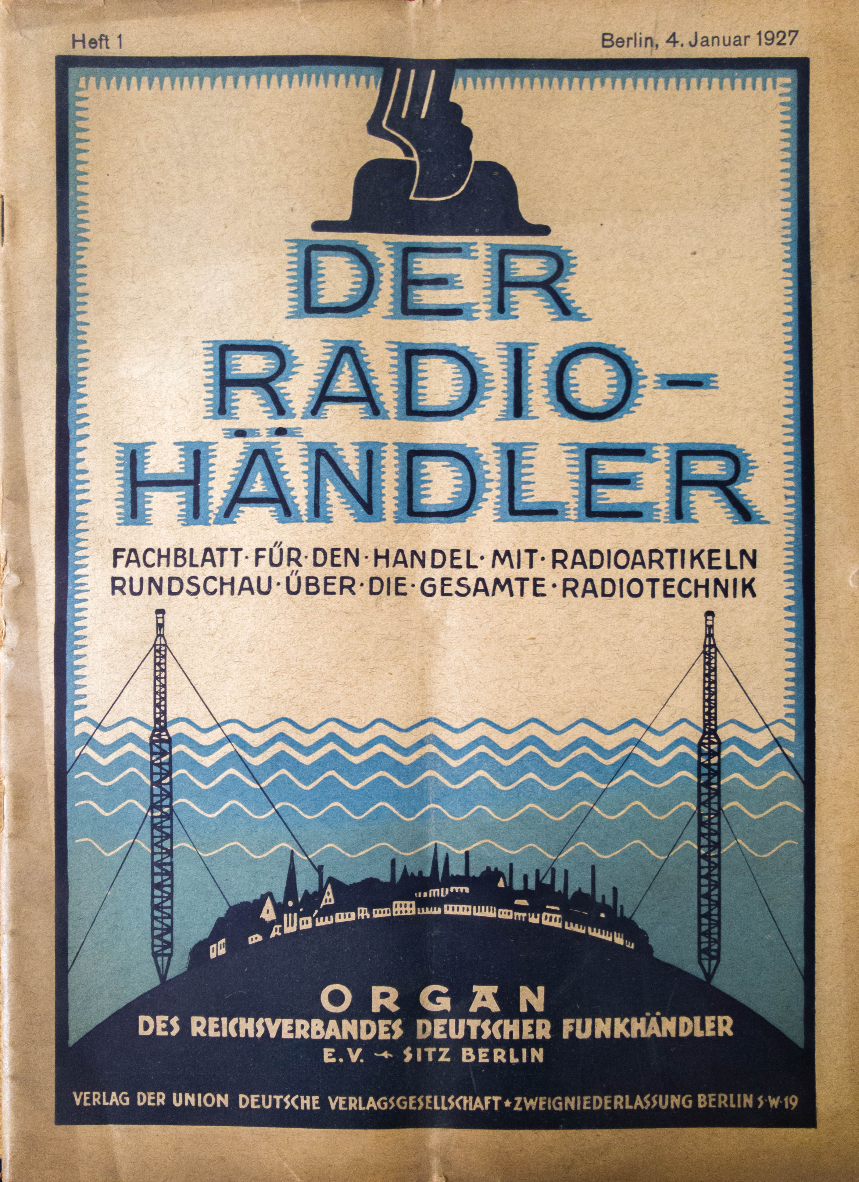 Titelblatt der Rundfunkfachzeitschrift "Der Radiohändler", Ausgabe 1/1927